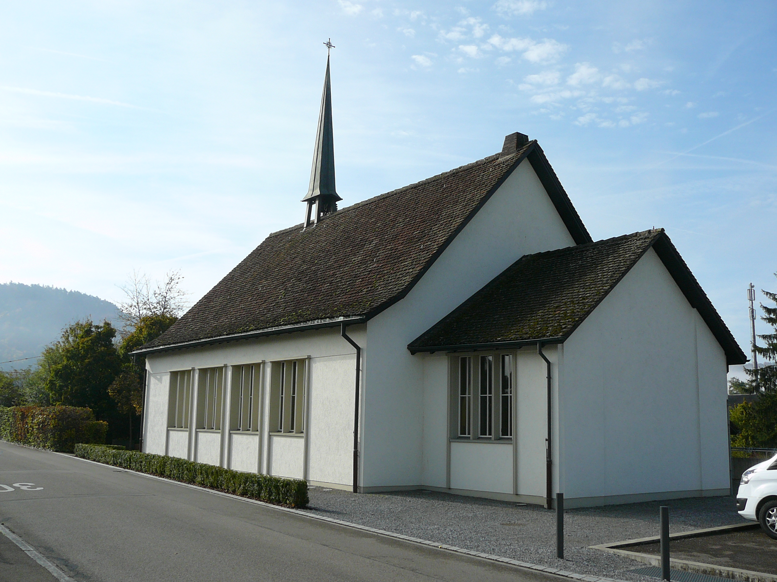 Römisch-katholische Pfarrkirche St. Judas Thaddäus Eglisau, Ansicht von Nordosten